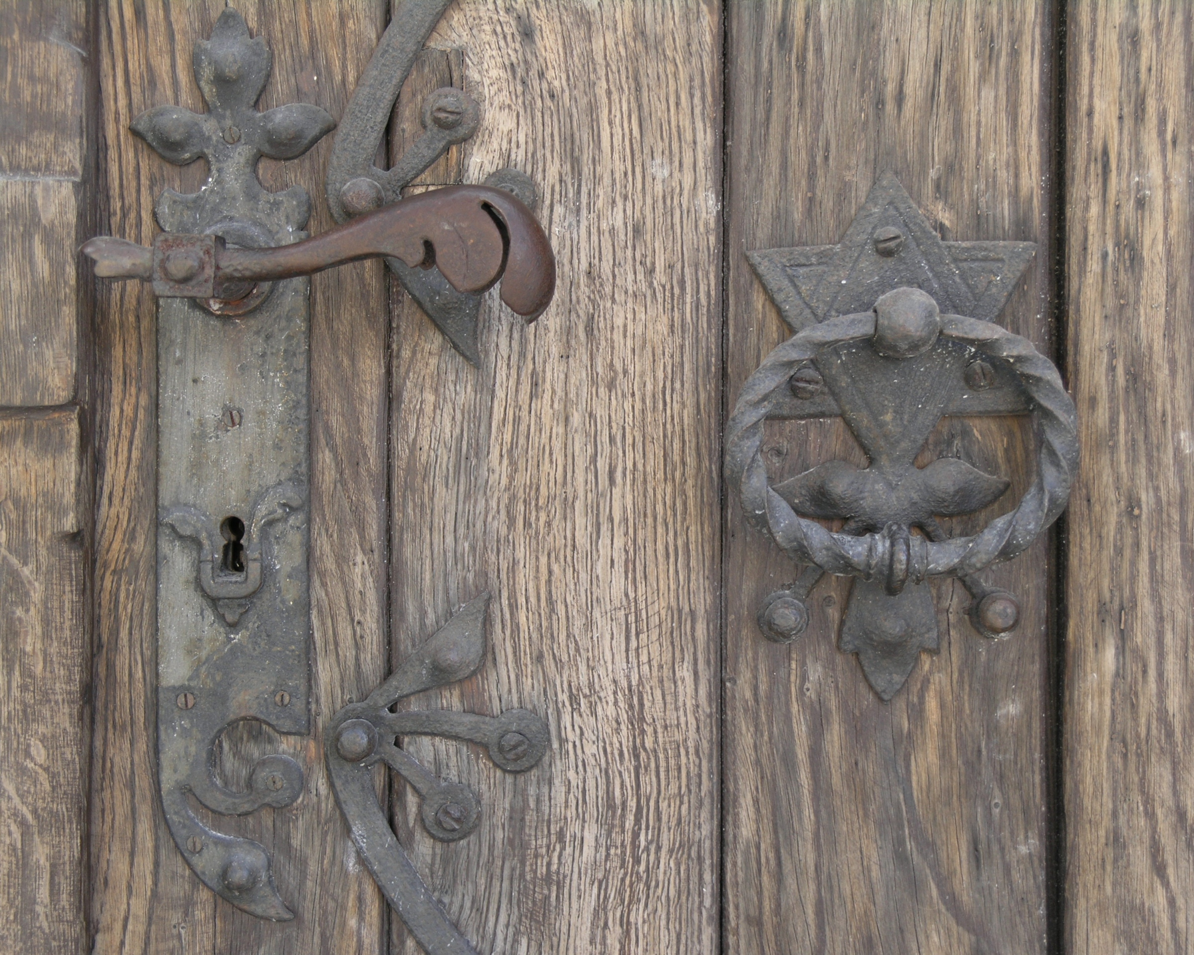 Česká republika, Jablonec nad Nisou - klika a klepadlo na dveřích kostela Dr. Farského